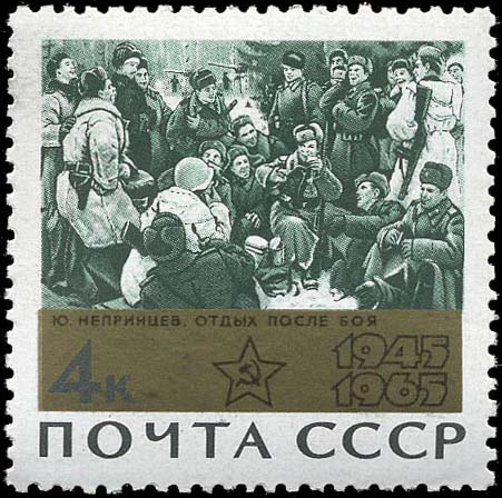 Почтовая марка СССР 1965 года из серии «20-летие победы советского народа в Великой Отечественной войне 1941—1945 гг.» под названием «Отдых после боя» (картина Ю. Непринцева, Государственная Третьяковская галерея в Москве. Оформление Е. Анискина. Номер — 3200 (ЦФА). Тираж — 4 млн экз.